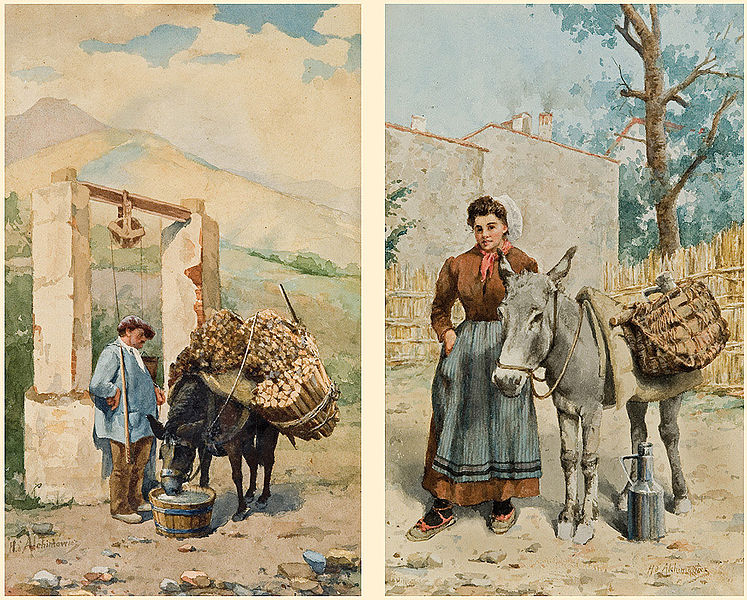 "Паенне асла/ Малочніца" Г. Альхімовіча